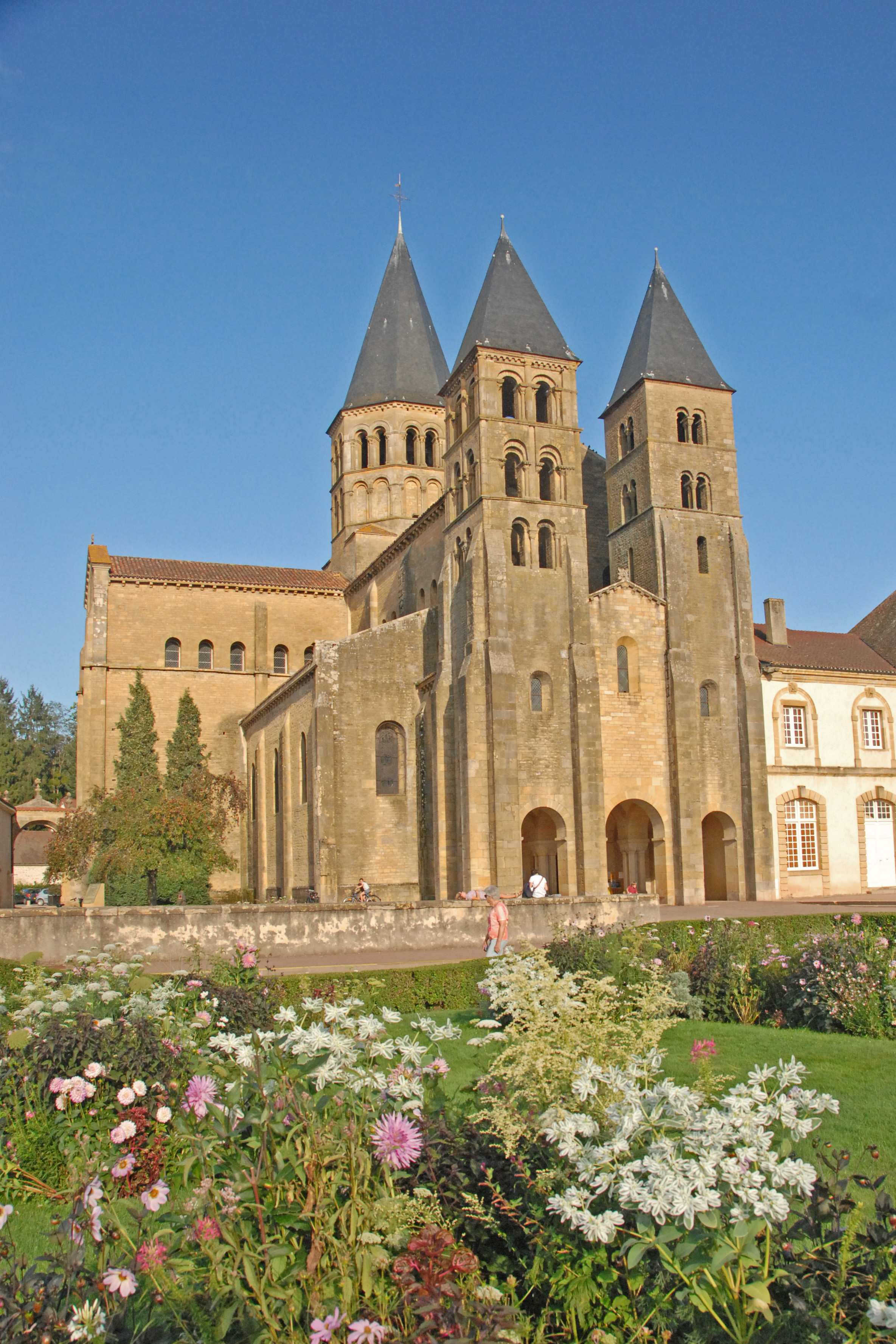 Sacré-Choeur von SW